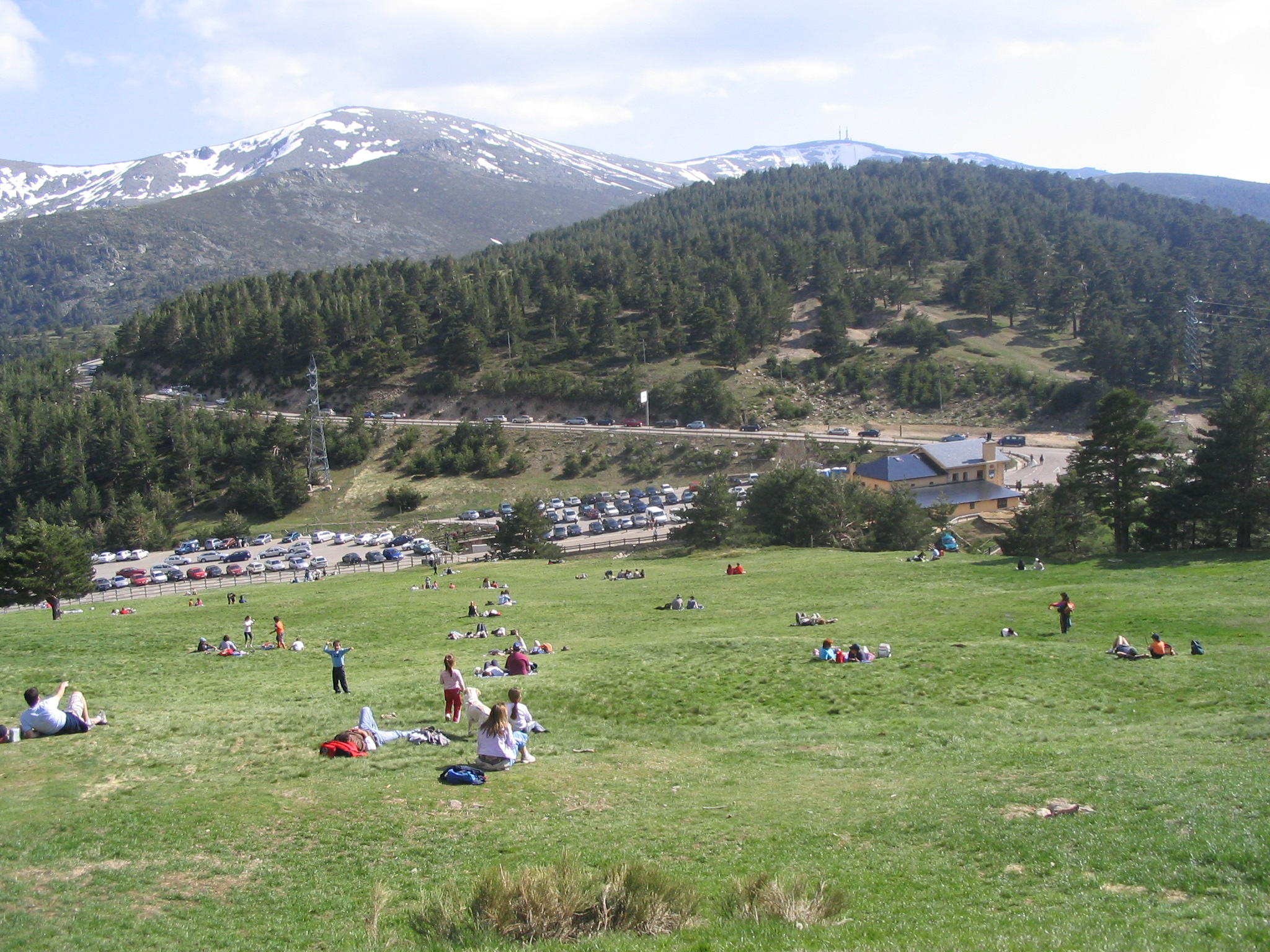 Vista de la pradera del puerto de Cotos (Sierra de Guadarrama), España.